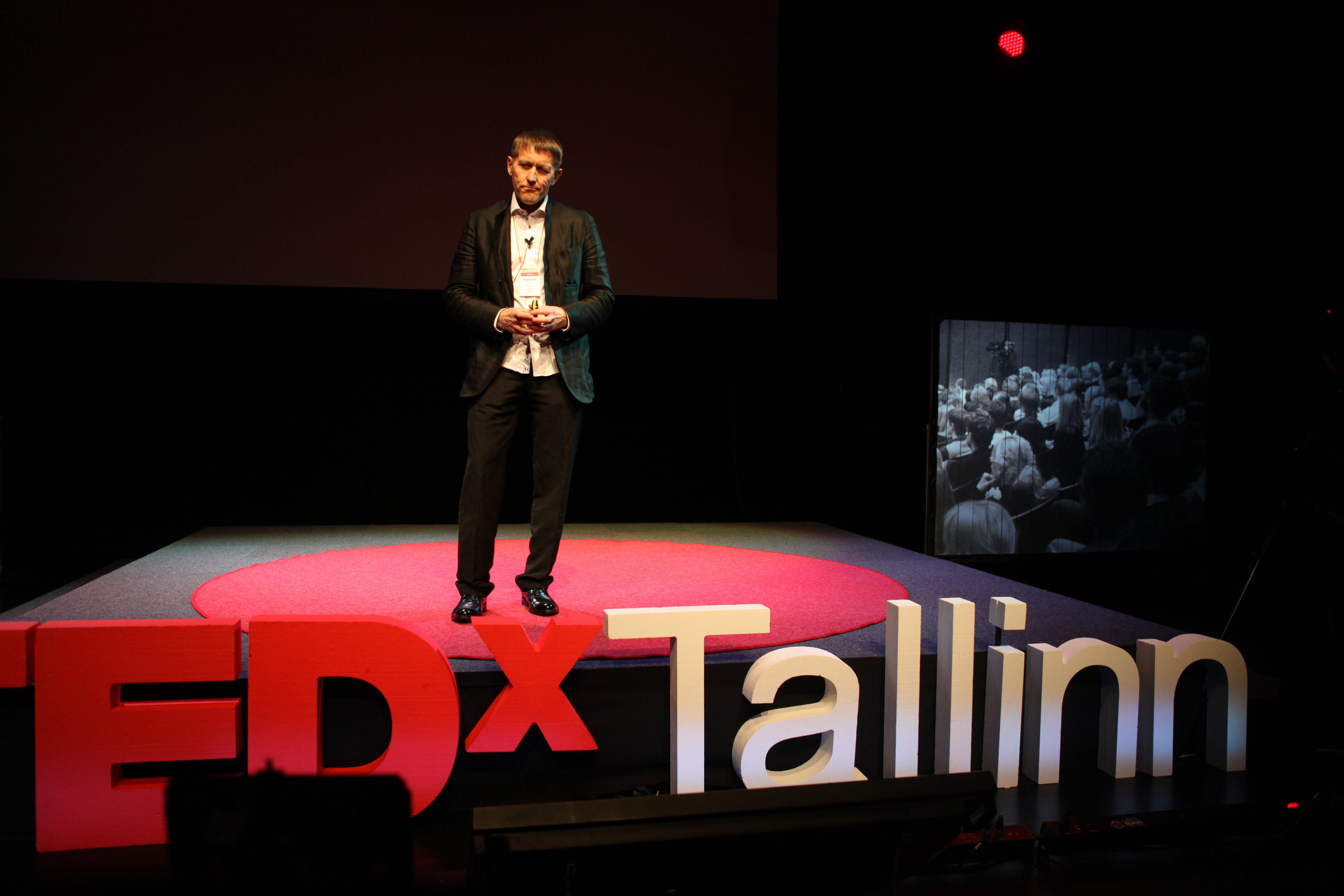 Hannes Tamjärv esinemas TEDxTallinn konverentsil 2012. aastal.